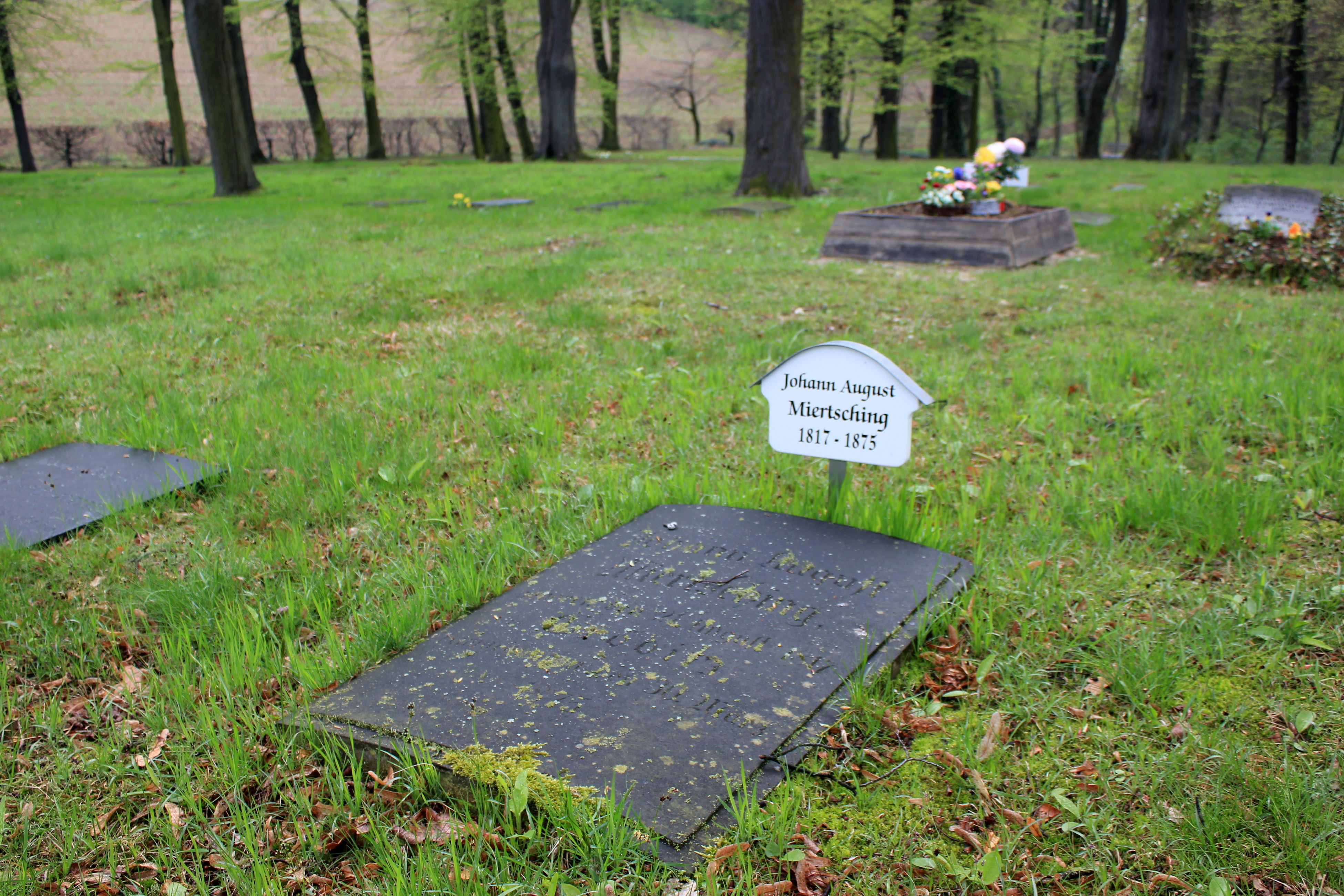 Hornjoserbsce: Row Jana Awgusta Měrćinka w Małym Wjelkowje.